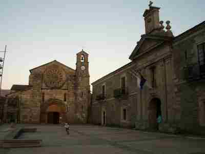 Colexiata de Sta. María e Concello de Meira. Uploaded by User:Agremon